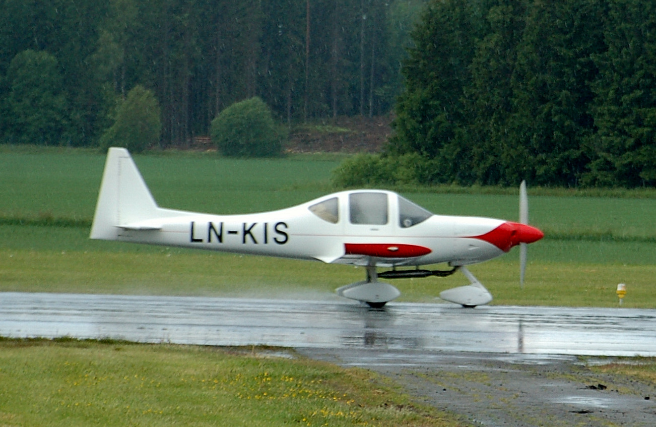 LN-KIS Manufacturer: Tri-R Technologies Model: (EX) KIS TR-1 Serial no: 32 Max TOW: 658 kg